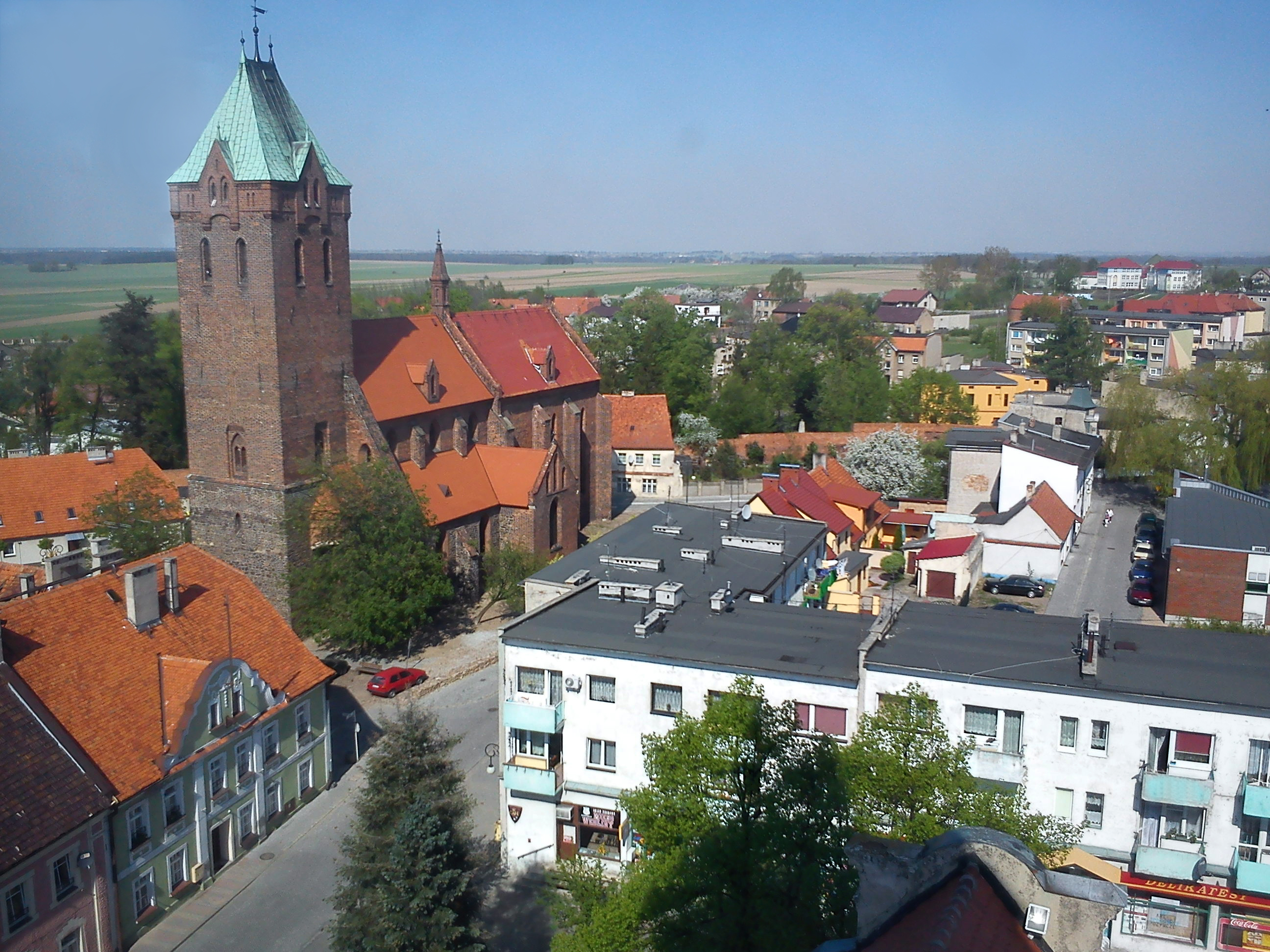 Byczyna, widok z wieży ratuszowej.